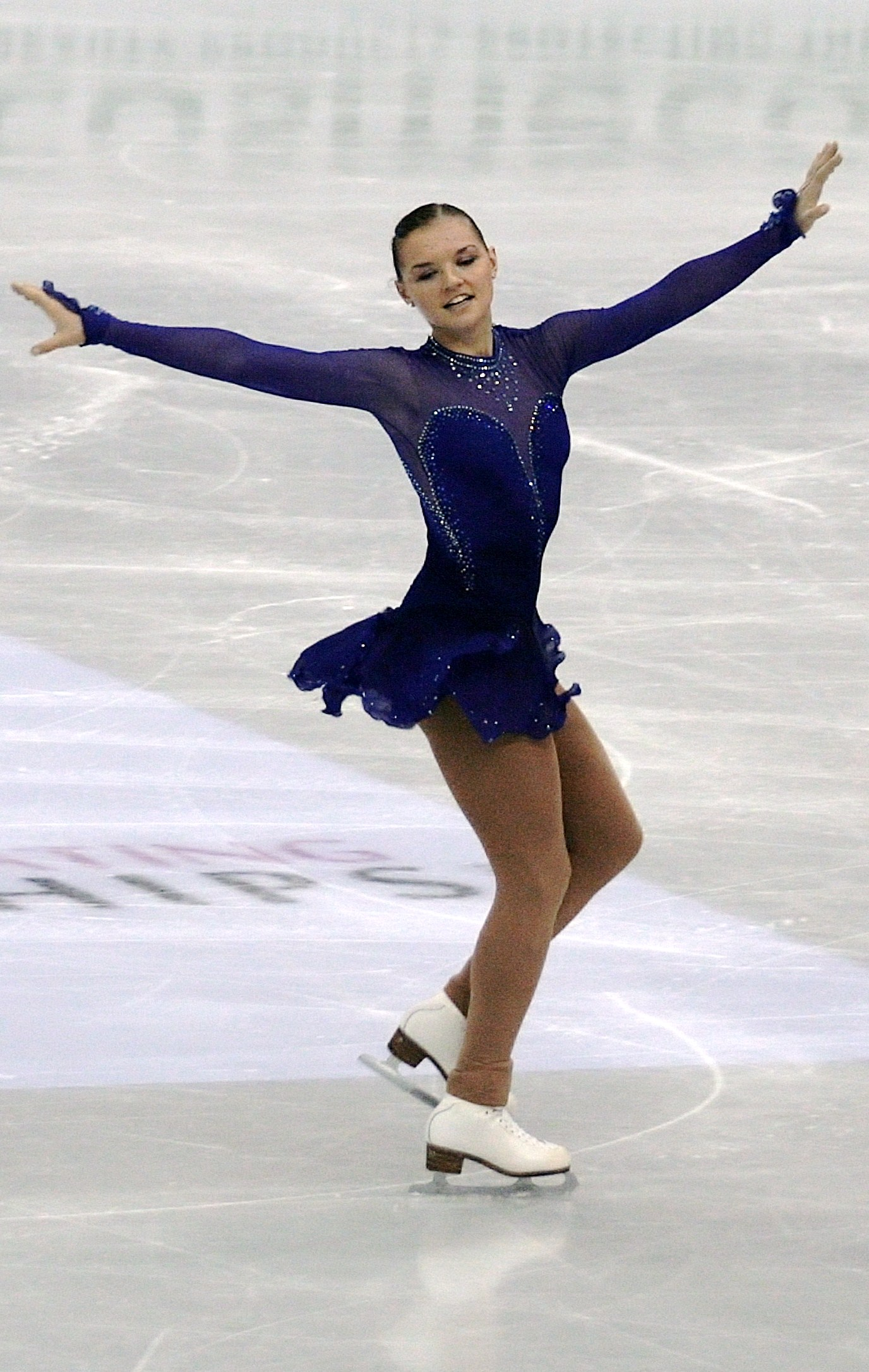 Наталья Попова (Украина) на чемпионате мира по фигурному катанию 2012